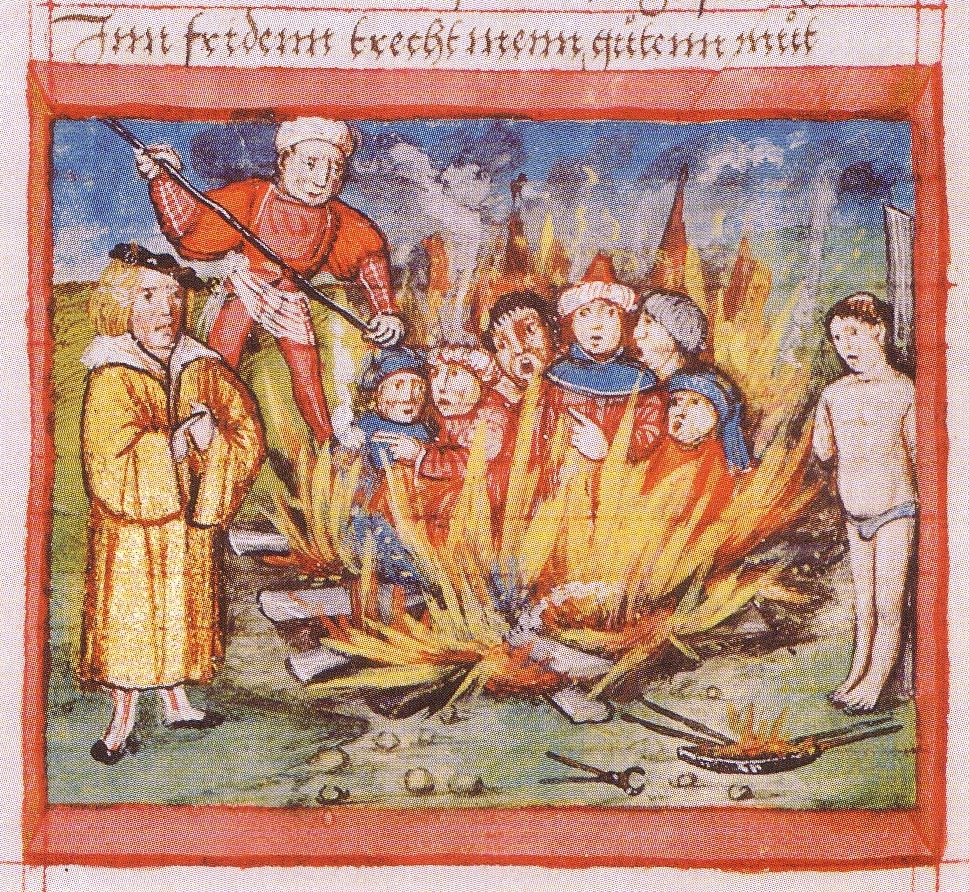 Judenverbrennung zu Sternberg unter Magnus II. (1492). , Miniatur 8,7 x 10,1 cm (fol. 103v). In: Nikolaus Marschalk: Mecklenburgische Reimchronik. (Schweriner Kodex von 1521/23, Landesbibliothek Mecklenburg-Vorpommern, Signatur: Ms. 376). Text: 1. Buch, 81. Kapitel, überschrieben: "Wie die Jodenn zum Sternberg vonn eynem priester hernn Peter das heilige Sacrament kaufftenn vnnd marterten vnnd Herzog Magnus sie lies verbornnen, Vnnd weiter vonn Herzog Magnus vnnd Herzog Baltasars seynes bruders tode" (fol. 104). (cf. Textediton von 1739 In: Ernst Joachim Westphal: Monumenta inedita rerum Germanicarum ..... Leipzig 1739-45, S. 625-626 f.).